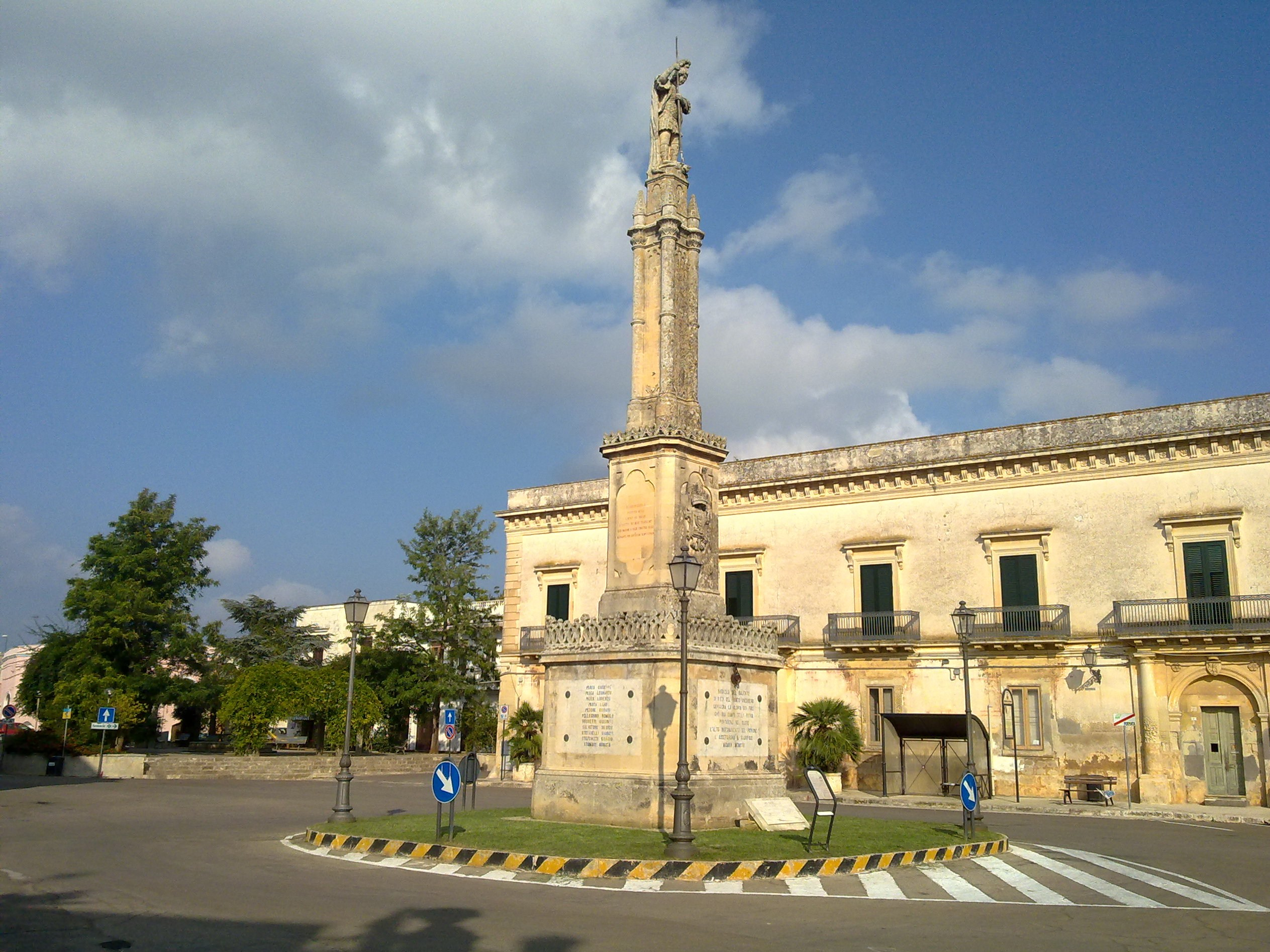 Piazza san Giorgio Bagnolo del Salento Lecce